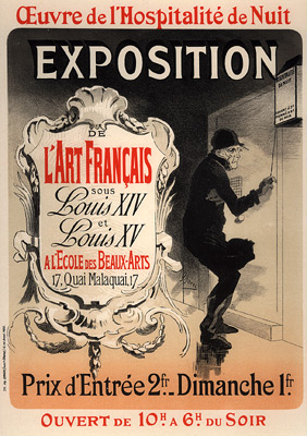 Affiche: Exposition de l'Art Française sous Louis XIV et Louis XV